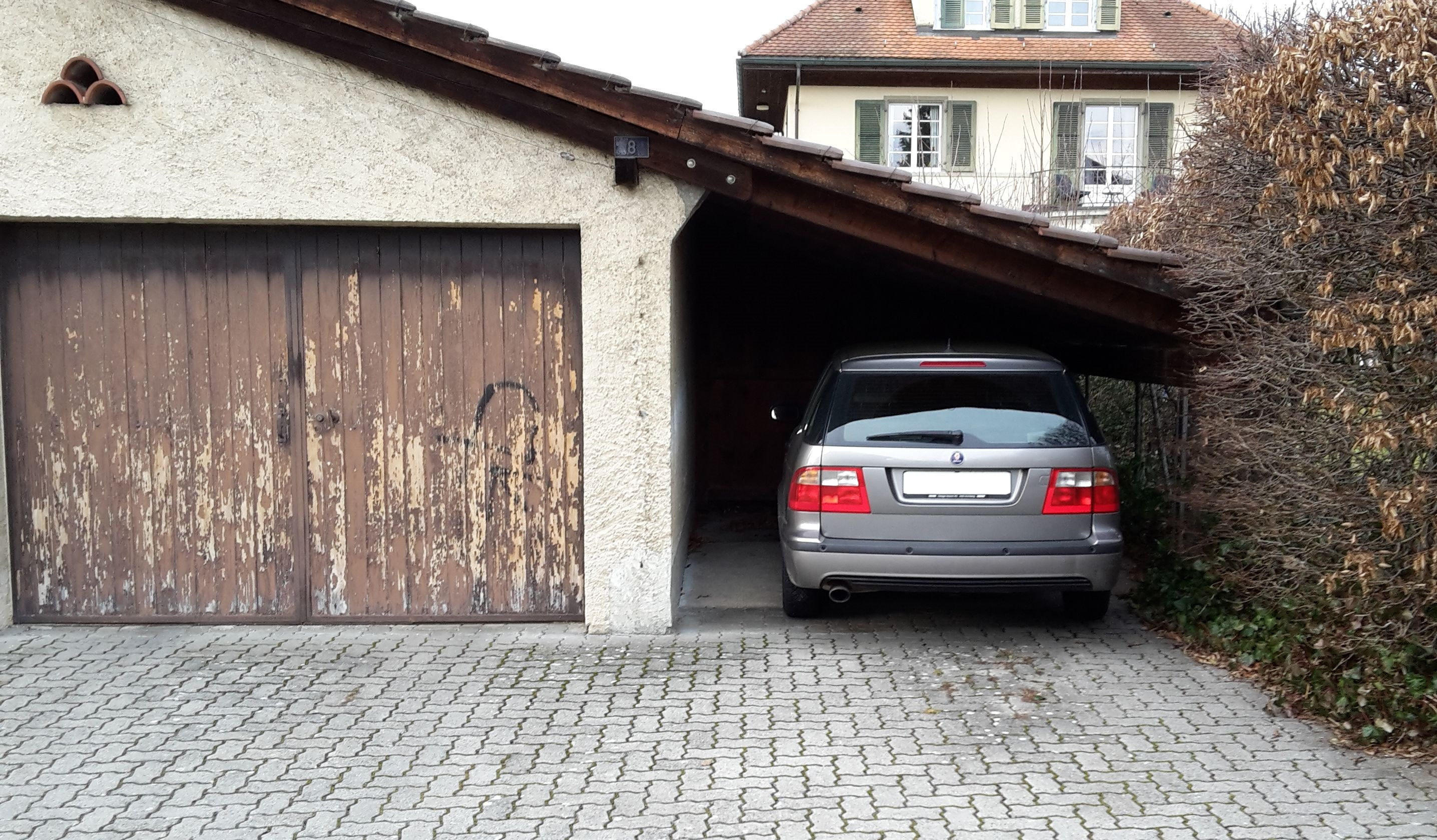 Einfach-Carport für 1 PKW unter verlängertem Dach